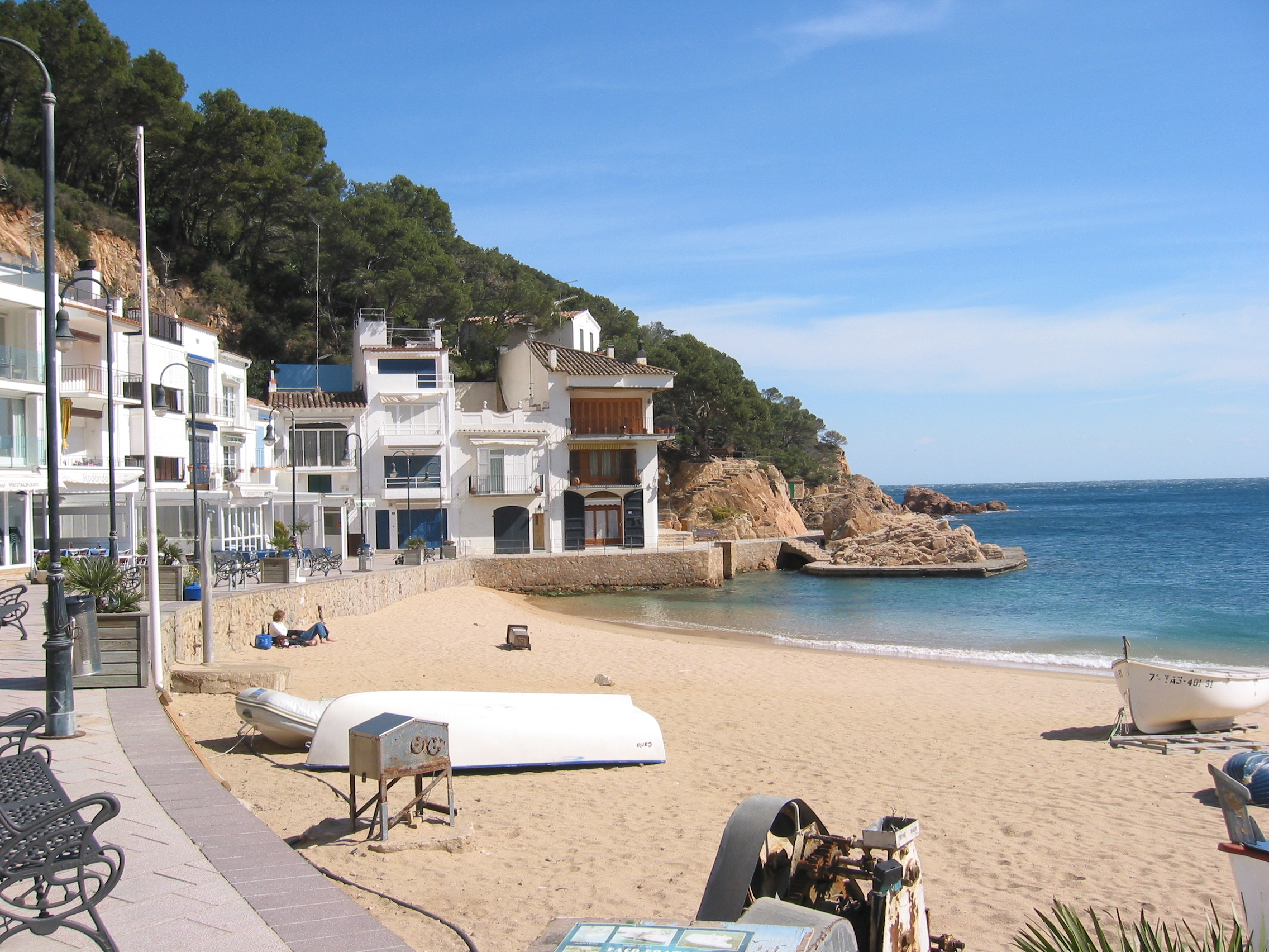 Tamariu